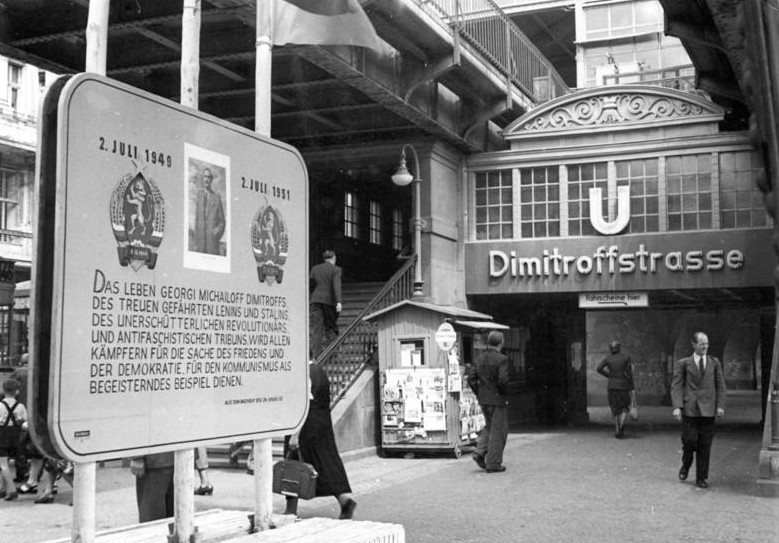 Illus-Junge Schw-Ho. 9.7.1951 Gedenktafeln zum 2. Todestag von Georgi Dimitroff in den Strassen von Berlin. UBz: Gedenktafel vor dem Eingang des U-Bahnhofs Dimitroffstrasse.